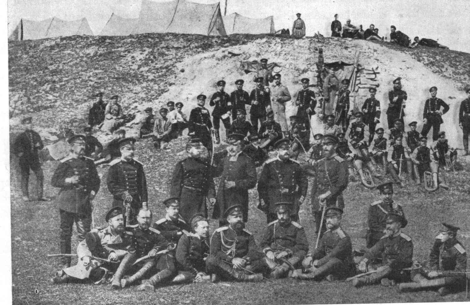 Soldiers of Finnish Guard sharpshooter battalion (Henkikaartin 3. Suomen Tarkk'ampujapataljoona in Finnish, Лейб-гвардии 3-й стрелковый Финский батальон in Russian) during Battle of Gorni Dubnik (Russo-Turkish War 1877–78)